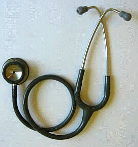 Stéthoscope - origine wiki nl: Krzysztof P. Jasiutowicz